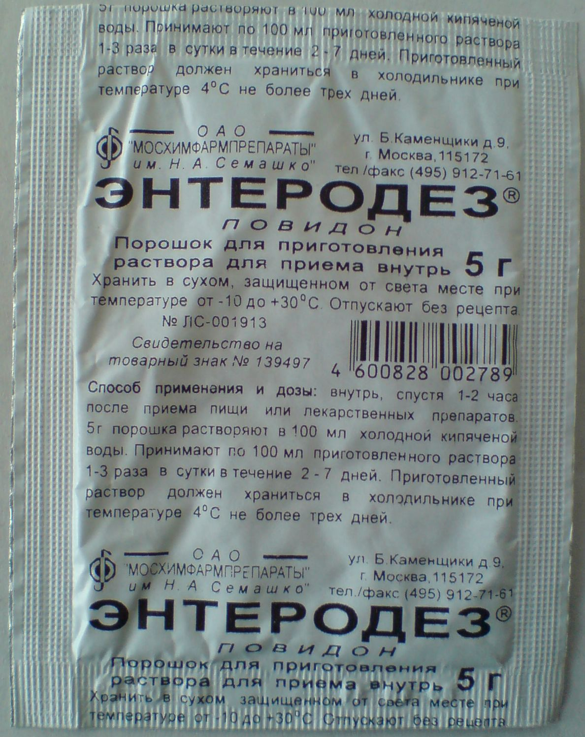 Лекарственный препарат «Энтеродез»